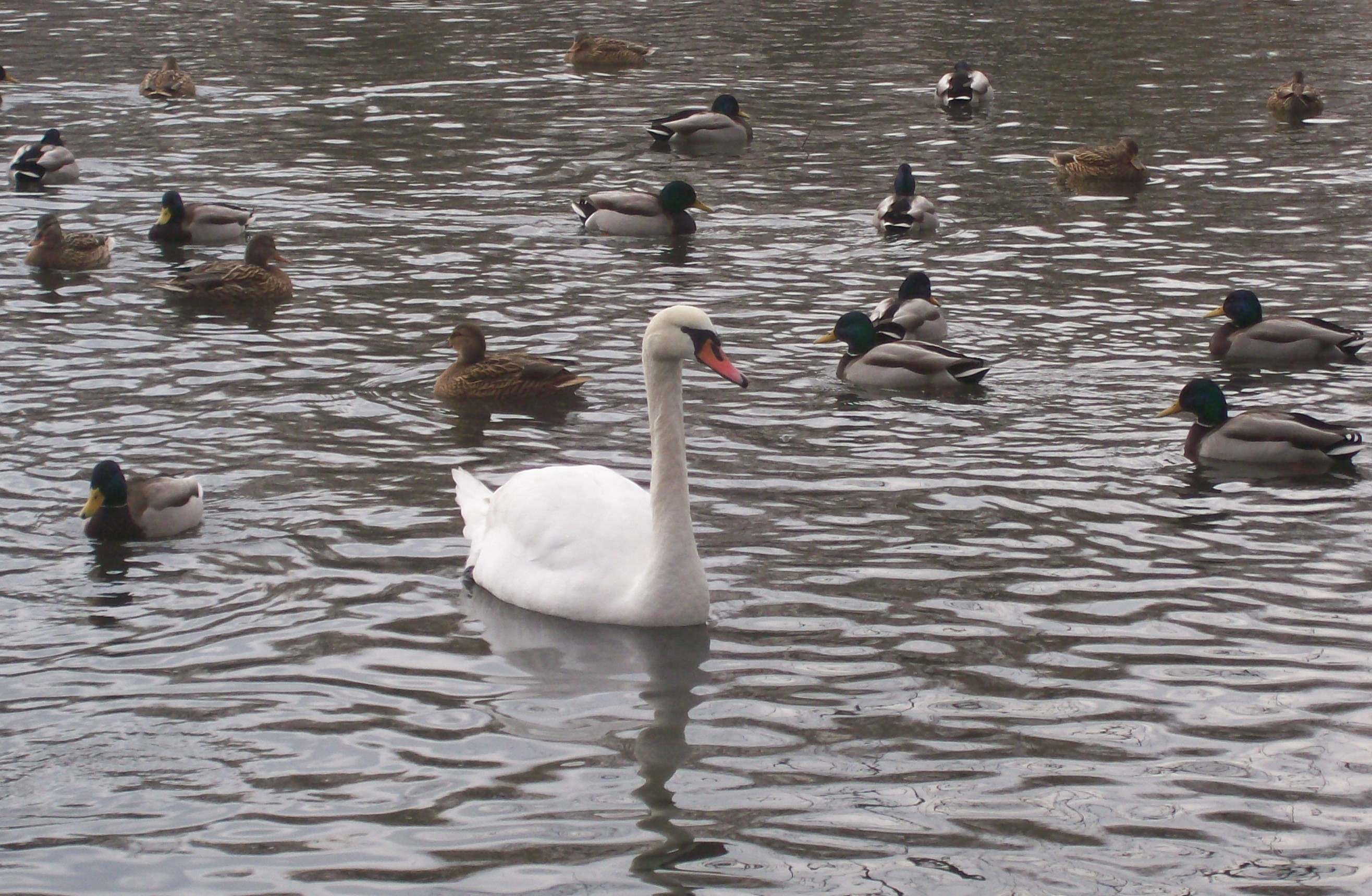 Description: Ptactwo wodne w Parku Północnym w Tychach Author:Ewkaa